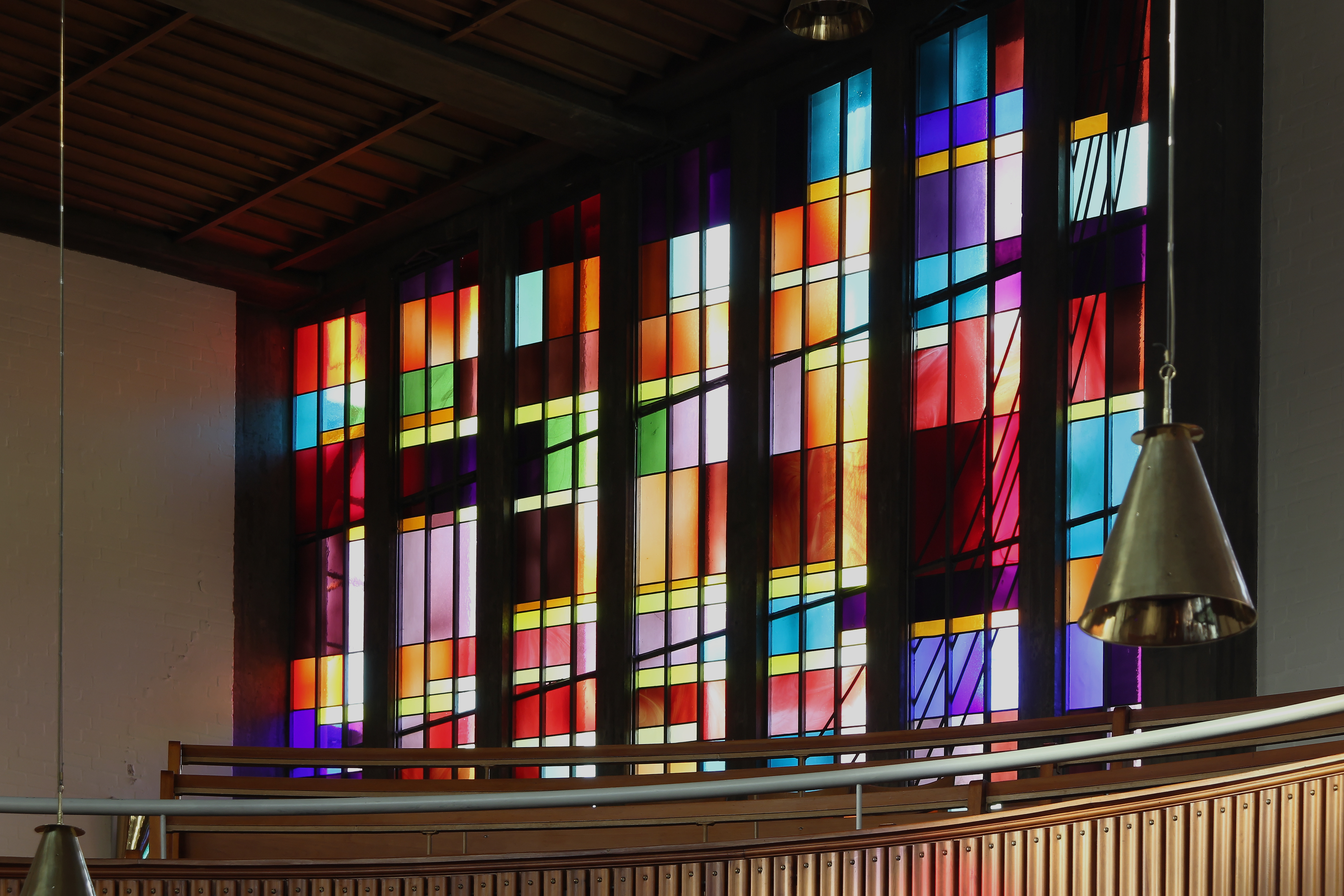 Hamburg-Harburg, St. Johannis Kirche, Westfenster This is a photograph of an architectural monument.